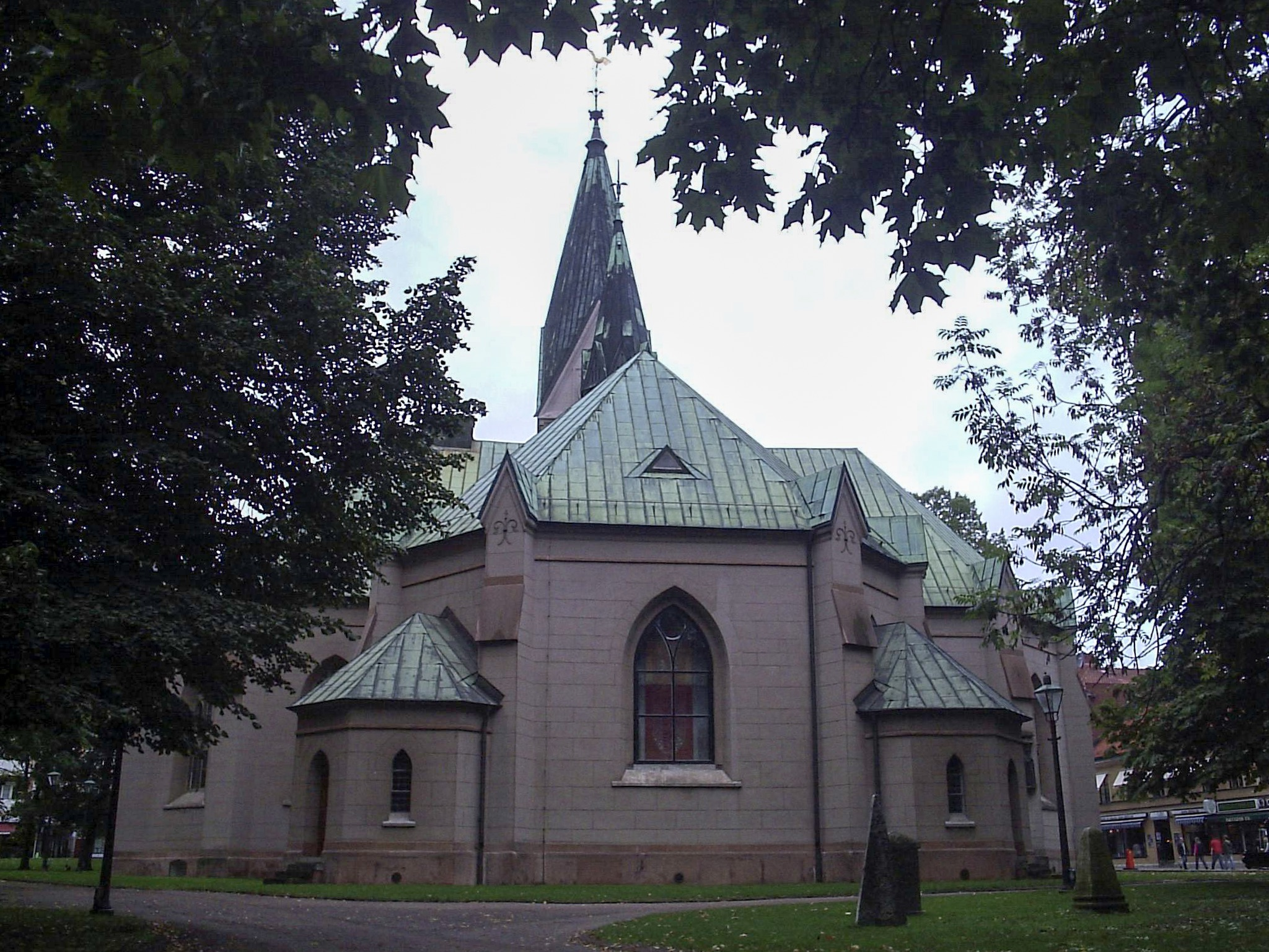 Bilden är fotograferad av Harri Blomberg. Photo by Harri Blomberg.